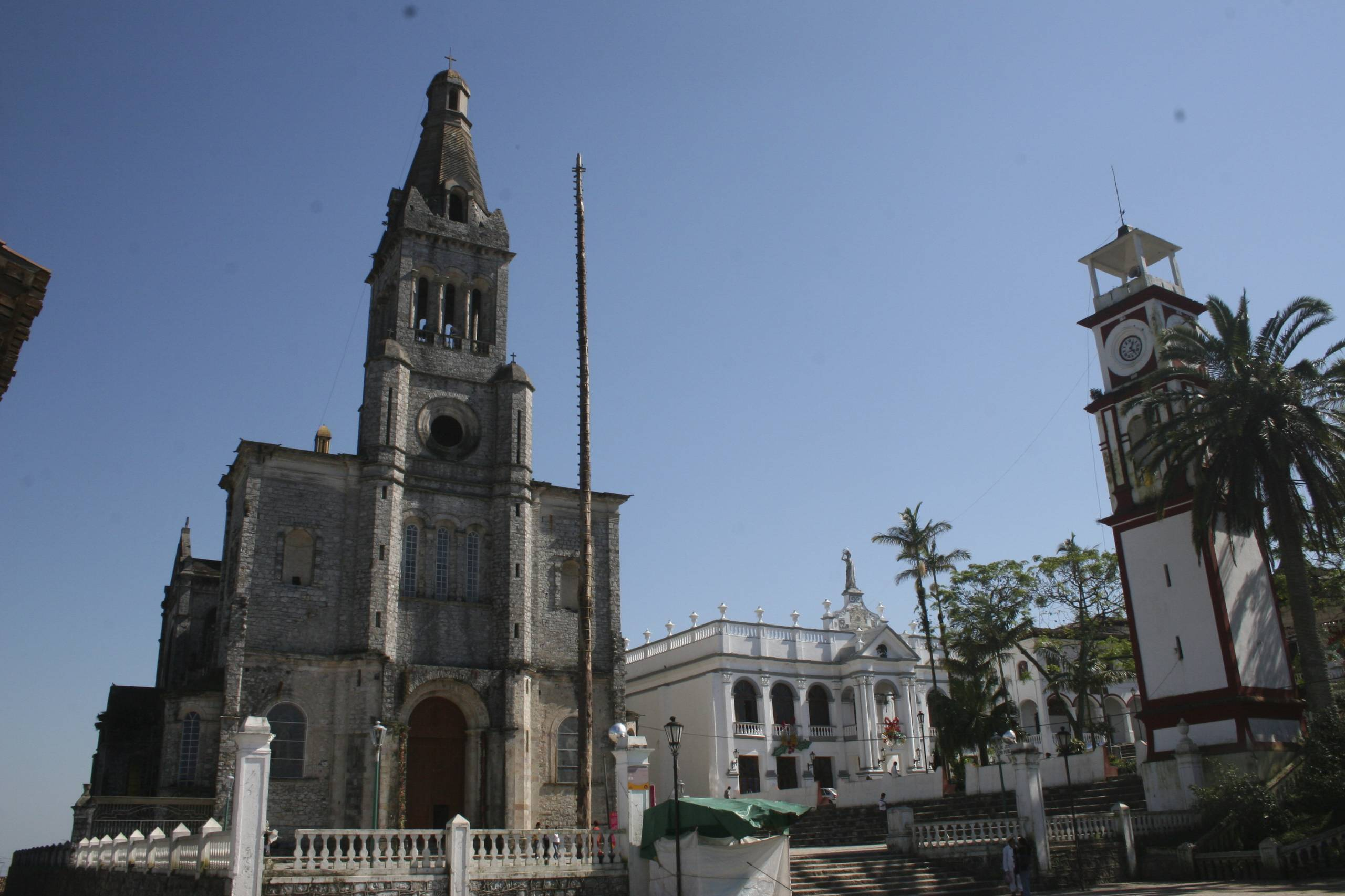 Iglesia Cuetzalán Puebla.